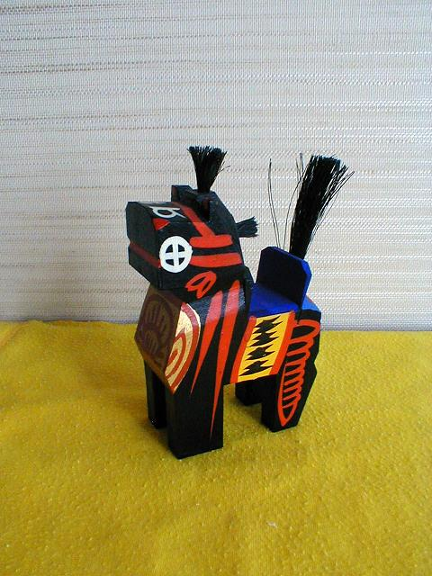 三春駒 2005年4月9日 投稿者撮影